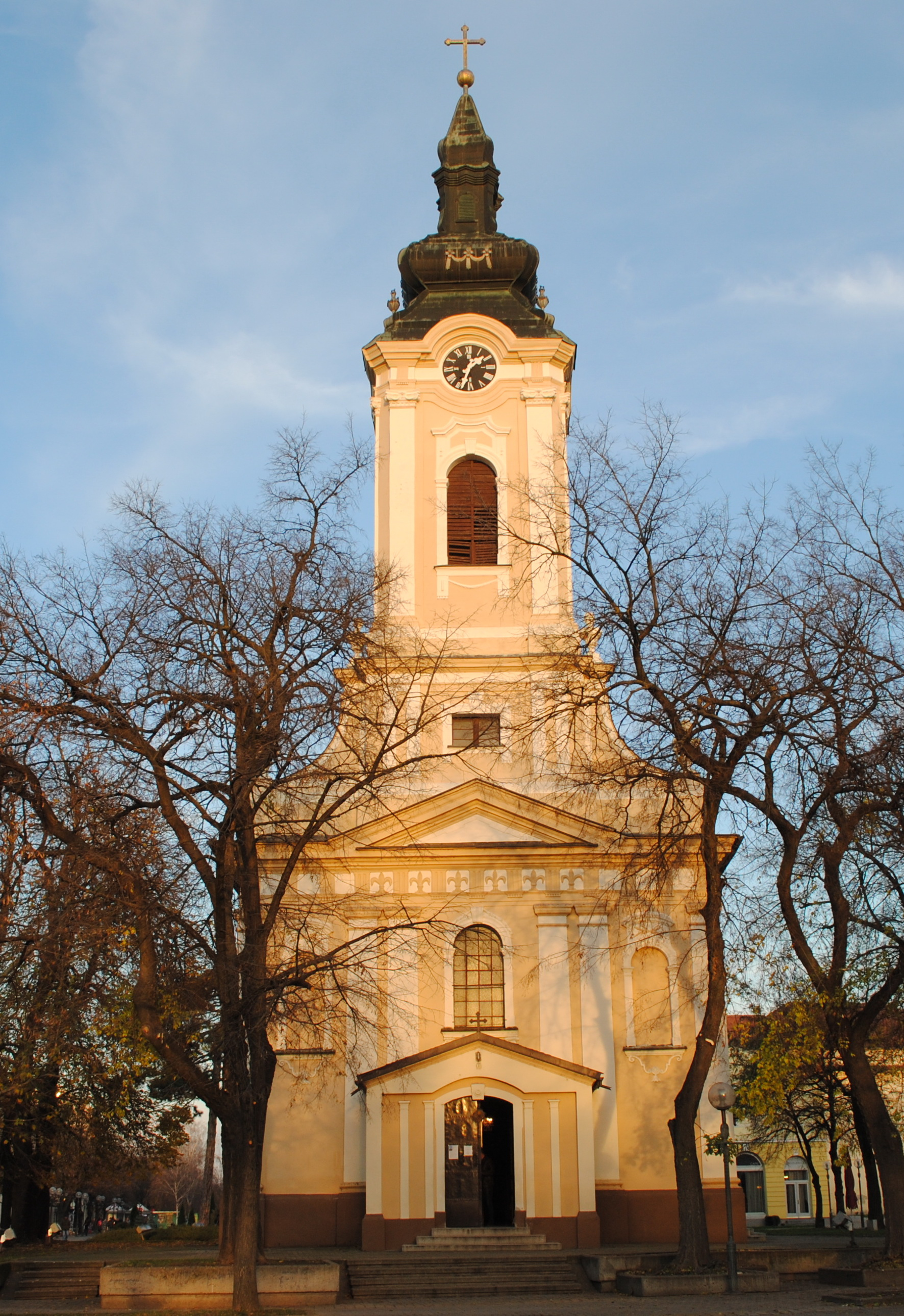 Srpski (latinica): Crkva je posvećena Svetom Nikoli. Sagradjena je 1769. godine. Spomenik je kulture od izuzetnog značaja (SK 1043).